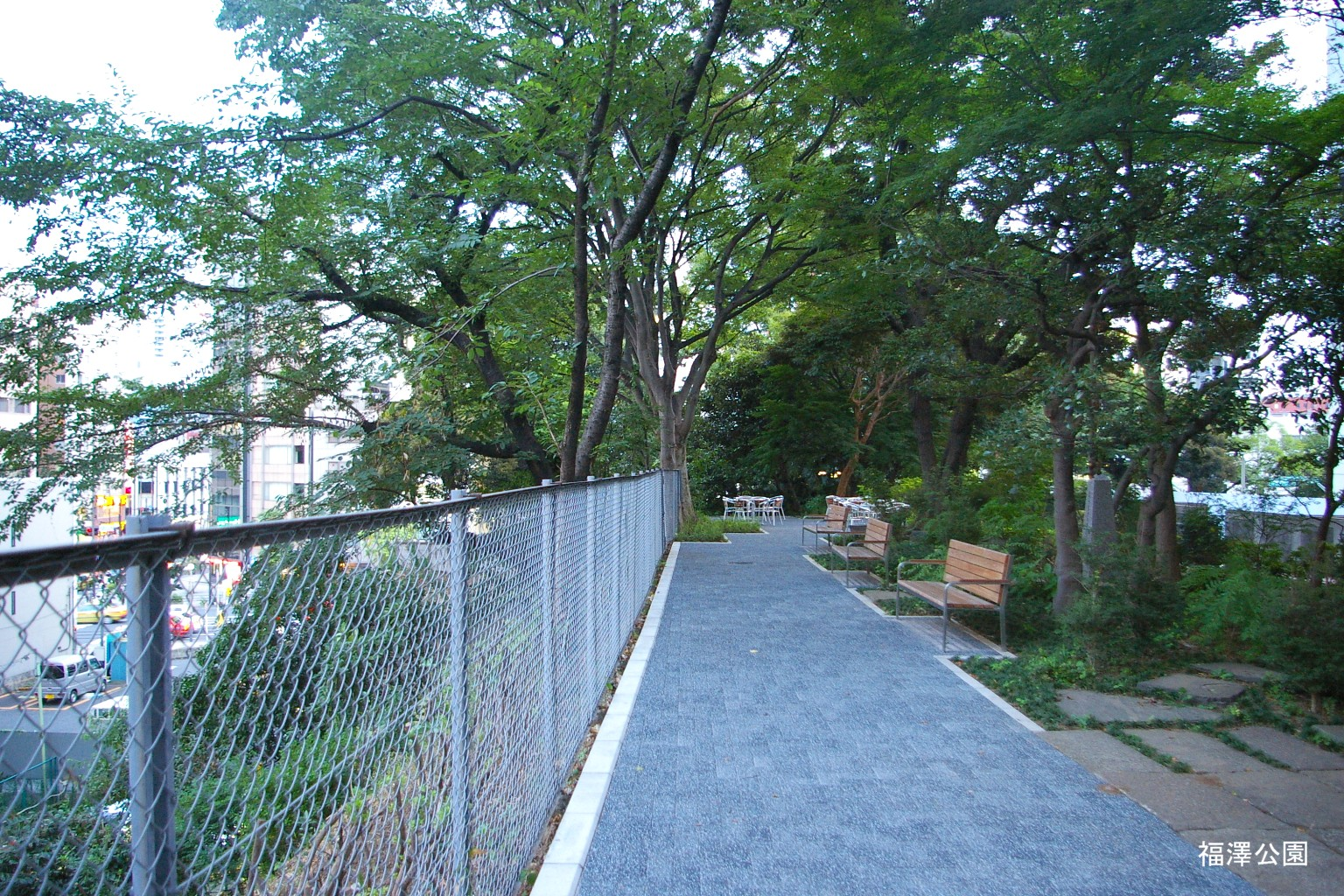 2009.5日本国内で塾生 (talk)が撮影。